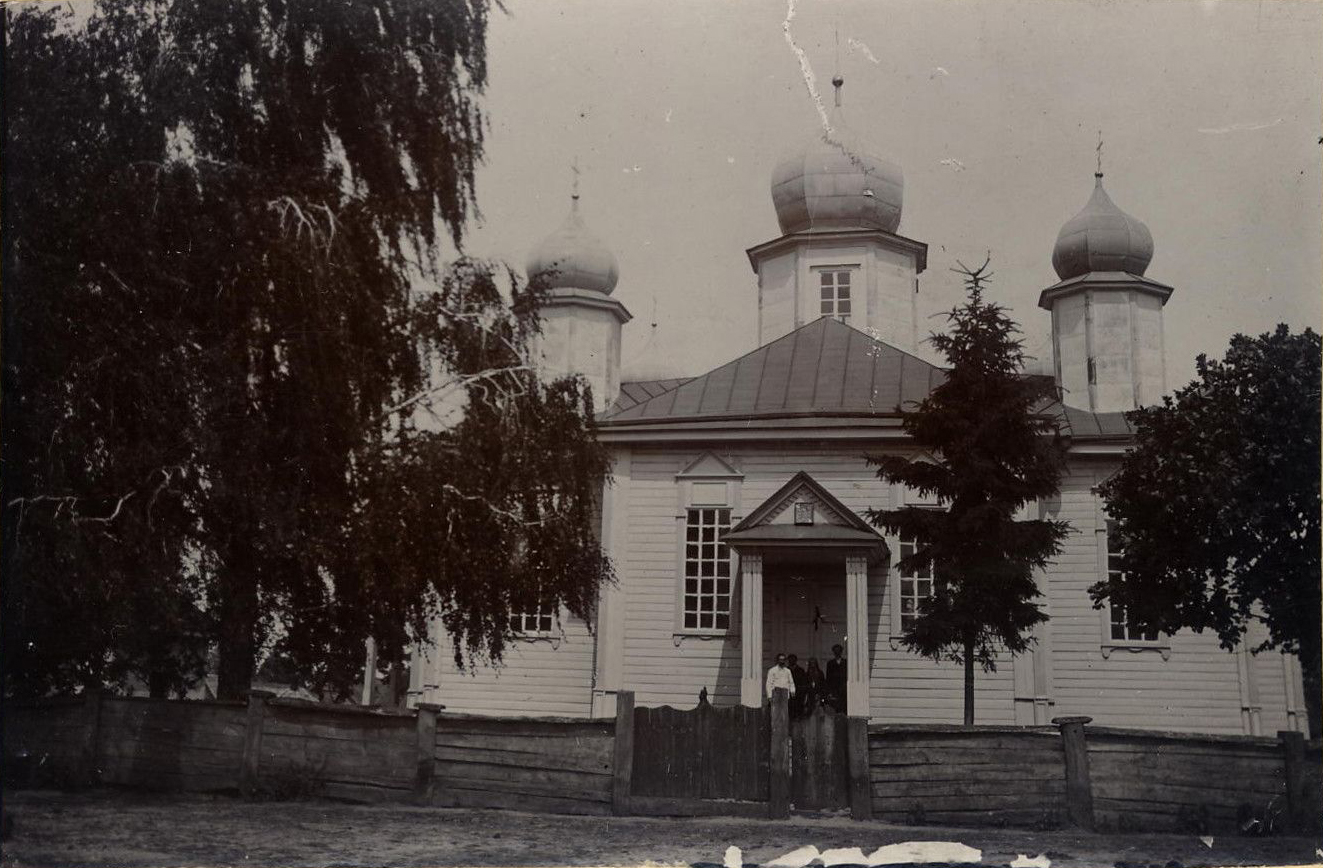 Беларуская (тарашкевіца): Плотніца (Płotnica). Пакроўская царква